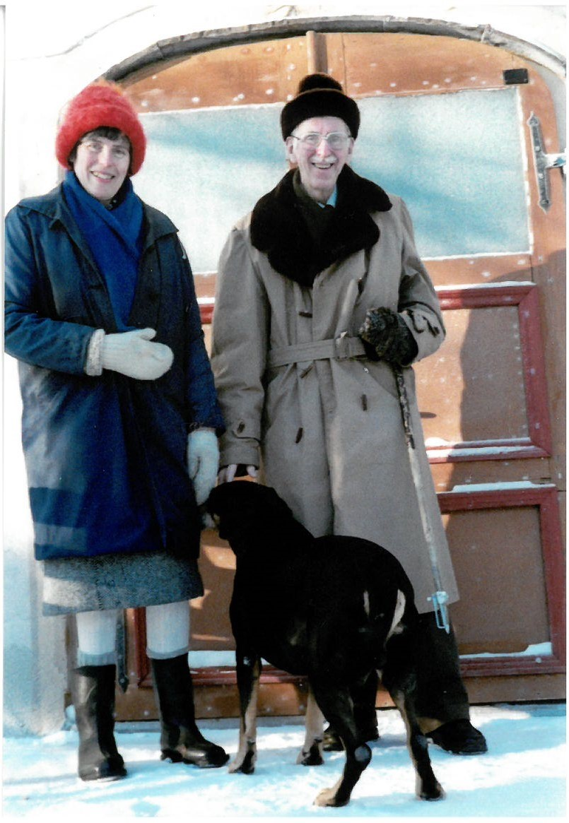 Kuva: Matti Huovinen